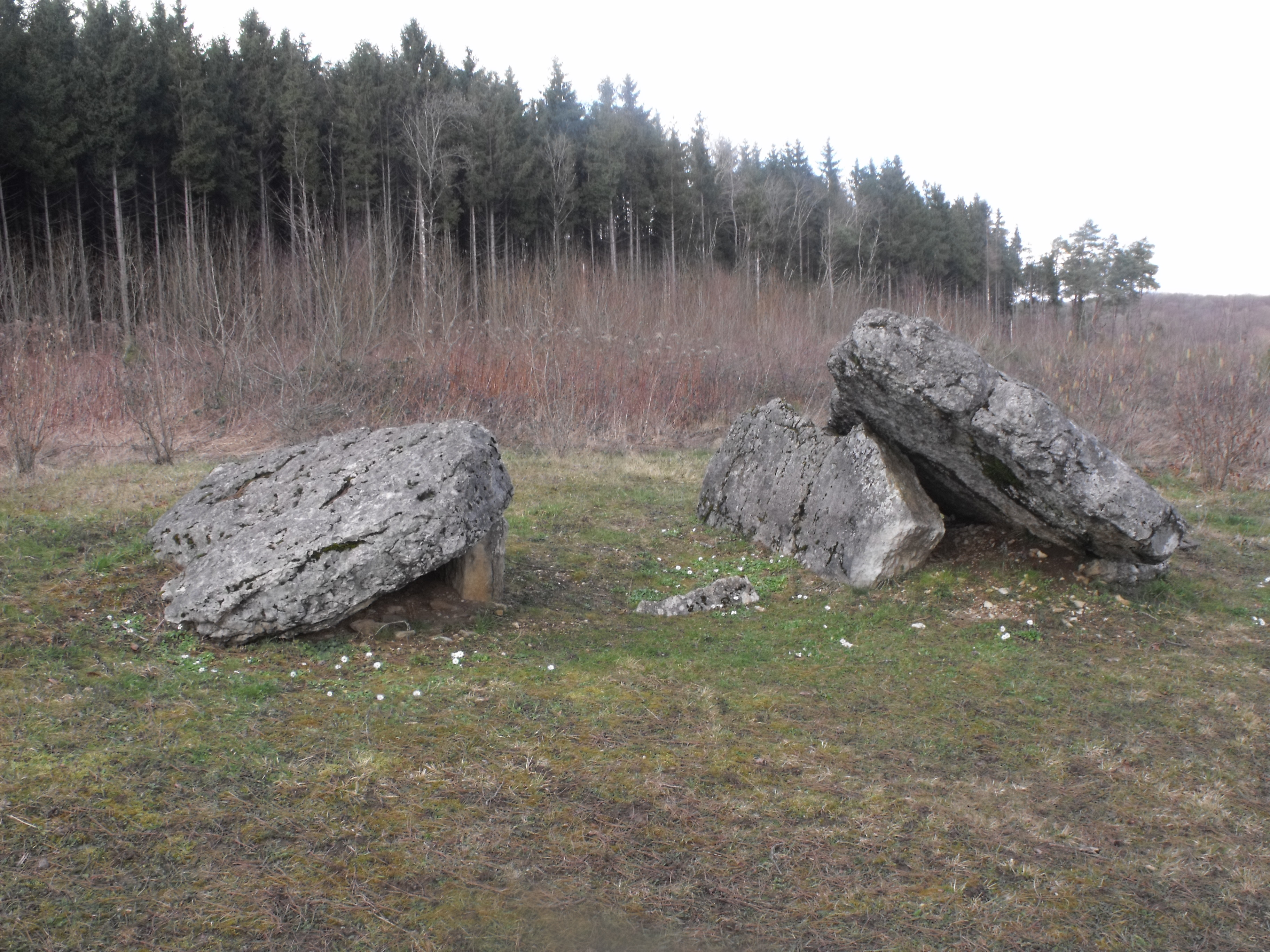 Dolmen de la Châtre, Santoche, Doubs, France